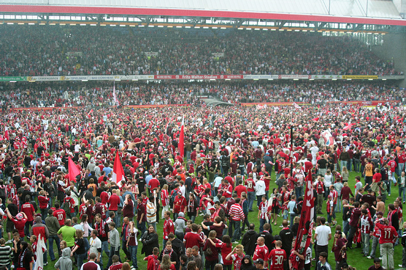 Nach dem Sieg im entscheidenden Spiel um den Klassenerhalt gegen Köln feiern die Fans auf dem Rasen des Fritz-Walter-Stadions